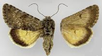 Lasionycta leucocycla albertensis female